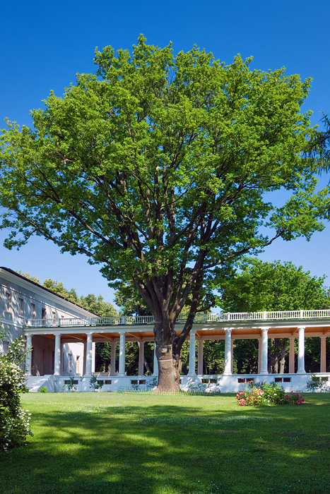 Парк (Москва и Московская область, Щербинка, село Остафьево)